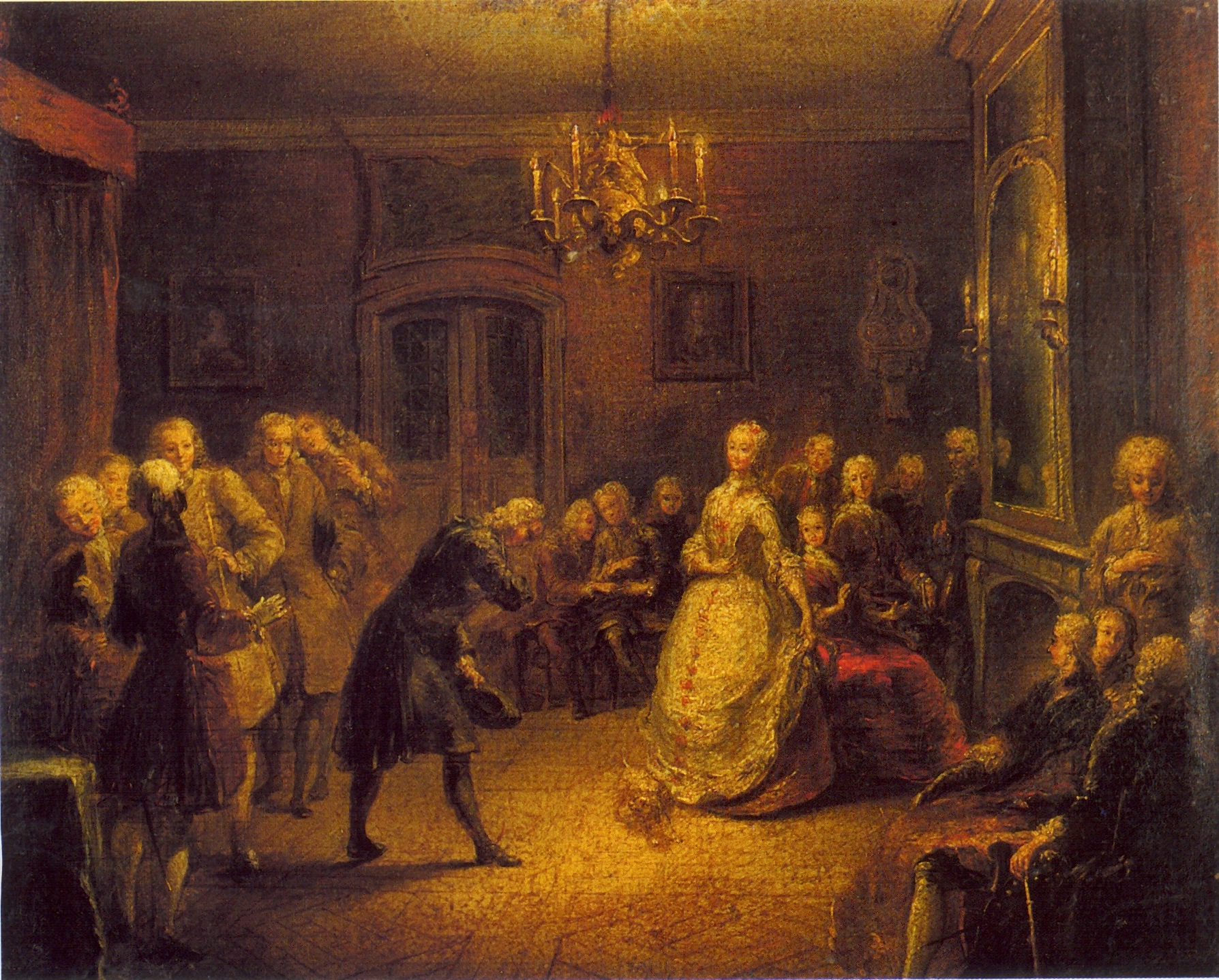 1739 (ca) - La conversation de salon Couleur